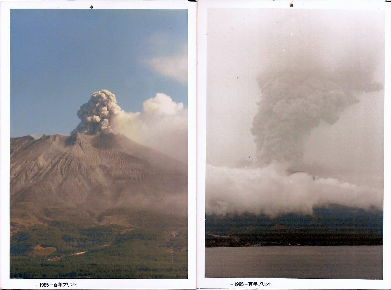 Uitbarstingen van vulkaan Sakurajima 桜島 in Kagoshima 鹿児島市 , zuidelijkste punt van Japan Foto's heb ik gemaakt tijdens mijn werk in 1984 / 1985. Map